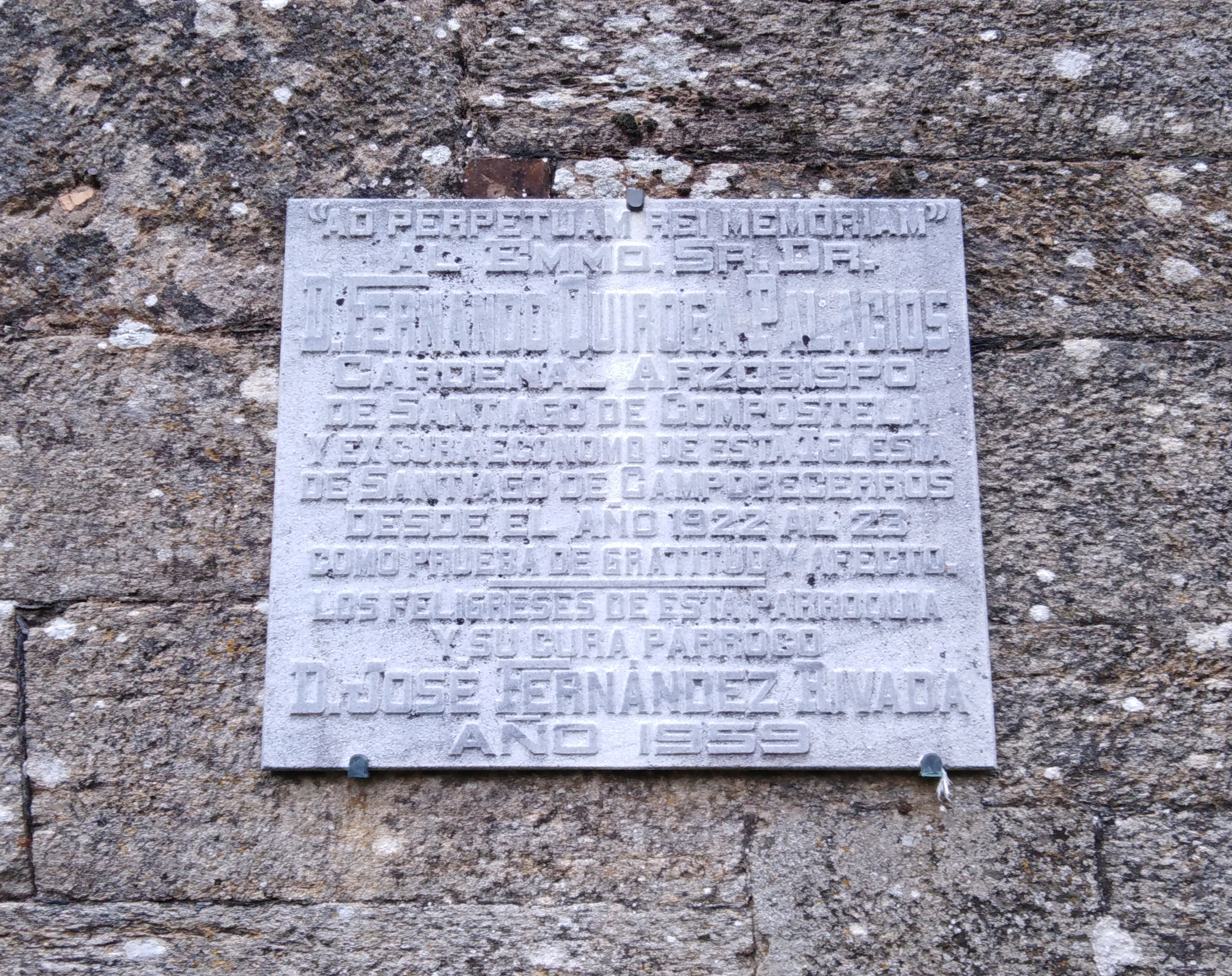 Placa en homenaxe a Fernando Quiroga Palacios en Campobecerros (Castrelo do Val)